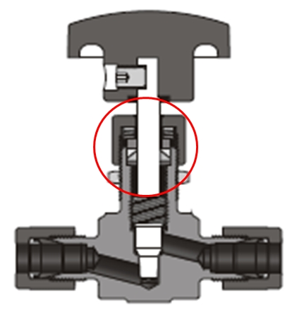 Design of a needle valve